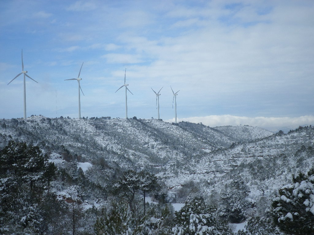 Parc Eòlic de la Serra de Rubió nevat